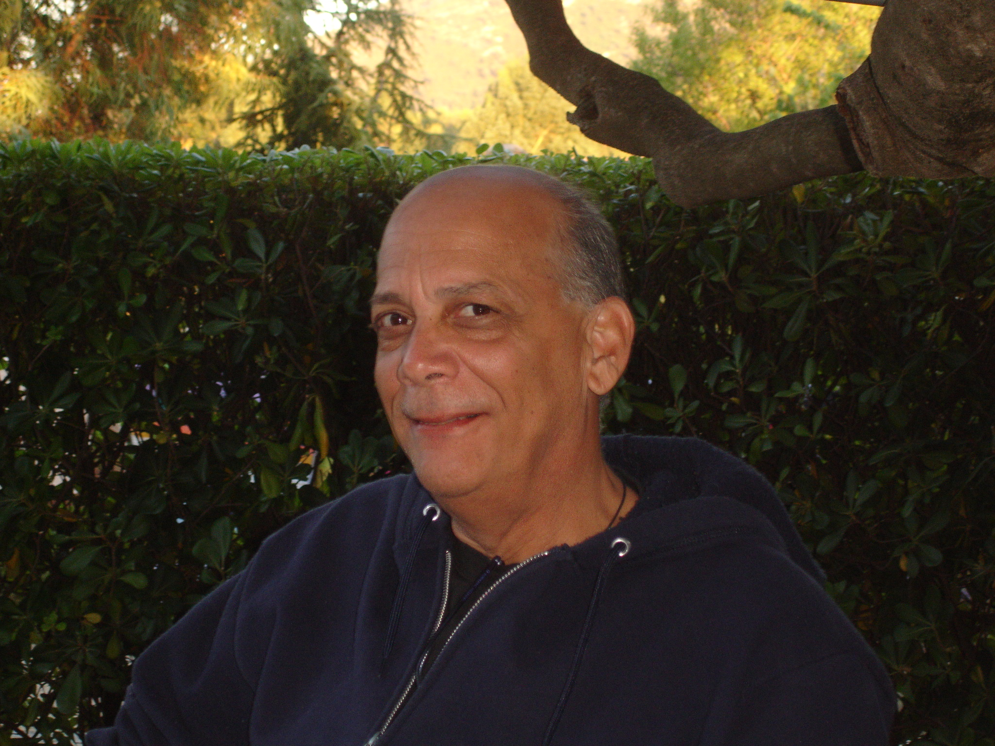 Photo de Burton CHENET été 2011